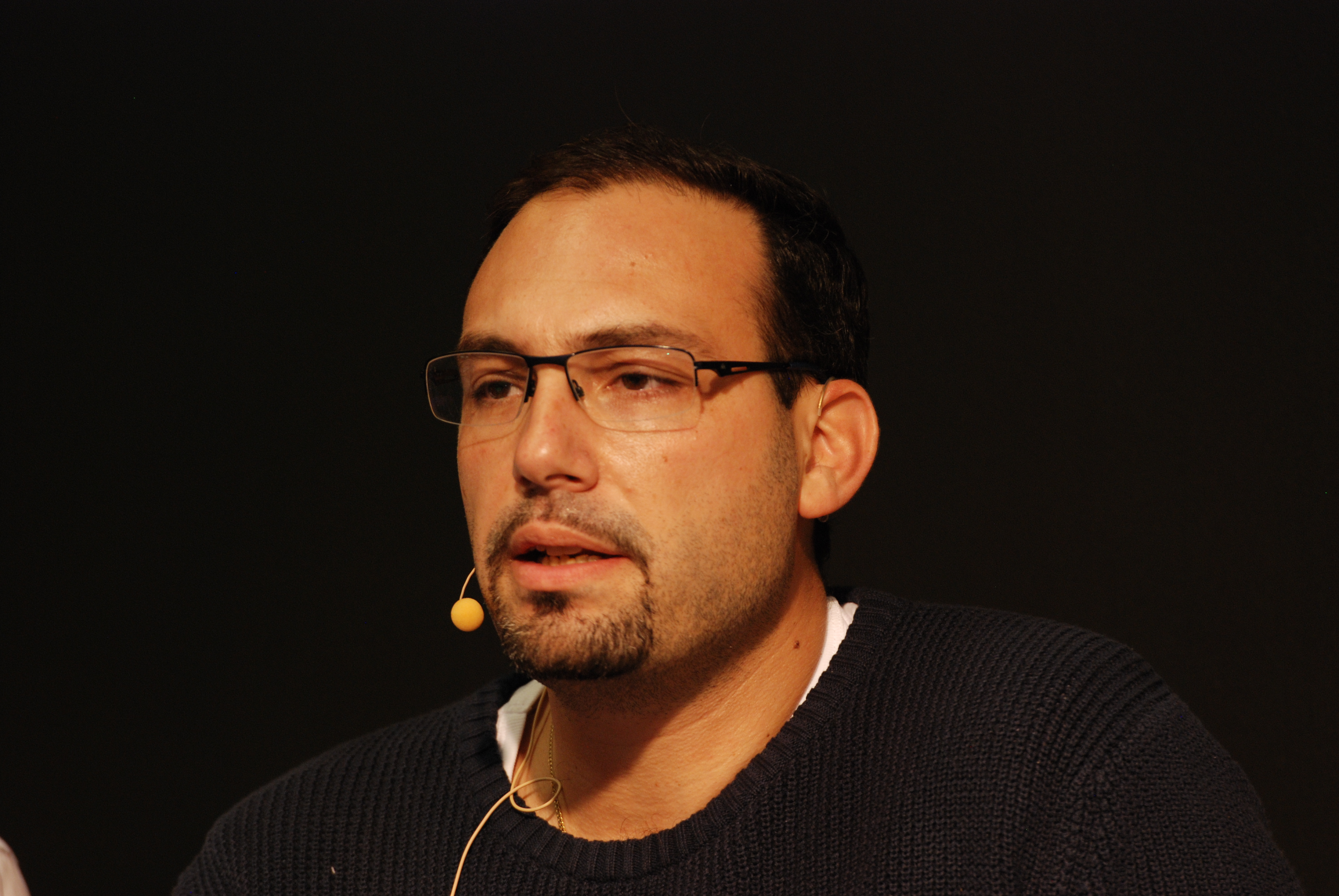 Vägvalets partiledare Theo Papaioannou i debatt om folkomröstningen om trängselskatt i Göteborg på Bokmässan 2014.